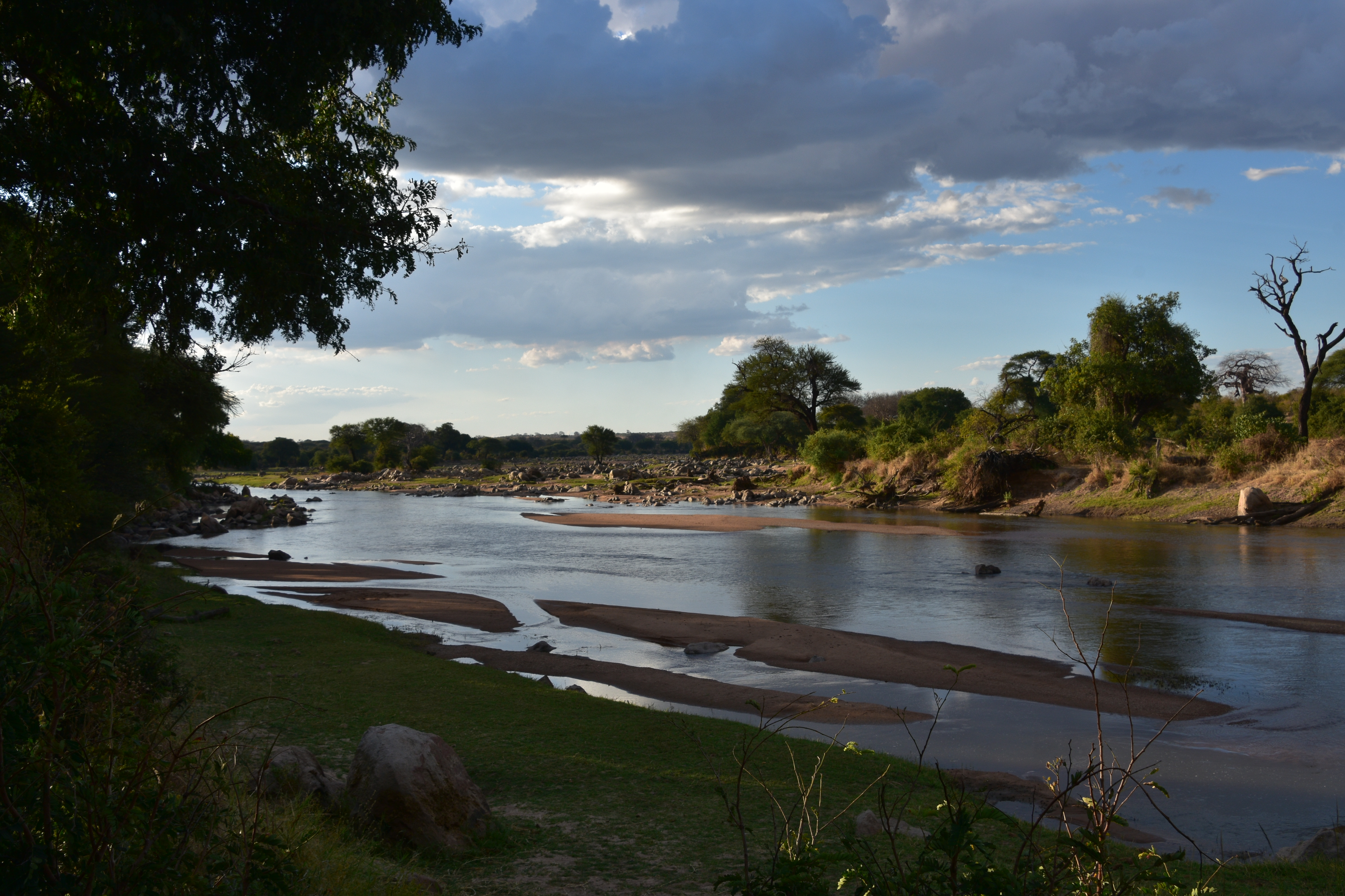 Ruaha River, Ruaha National Park (11)